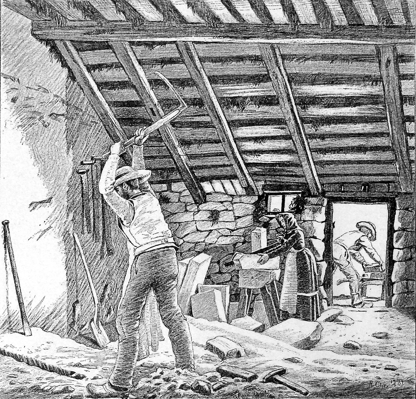 Limstensskærere ved Bulbjerg